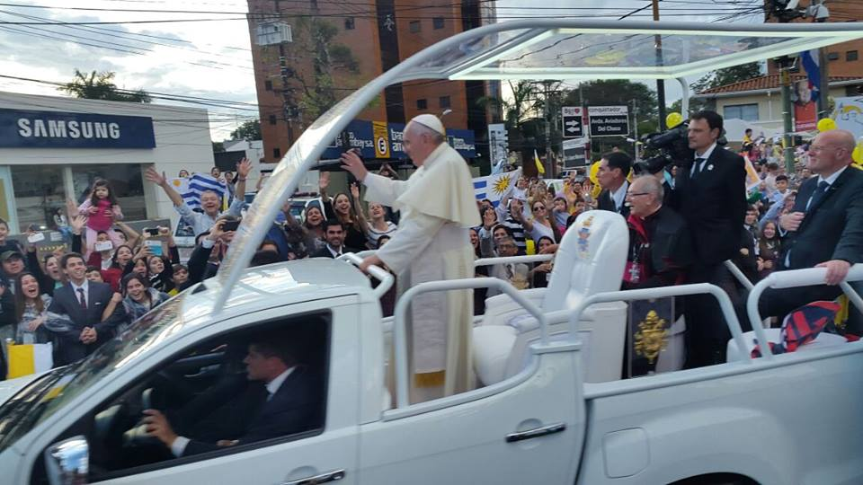 Papa Francisco durante uno de sus recorridos en el papamóvil, a poco de su arribo al país. Asunción, Paraguay.